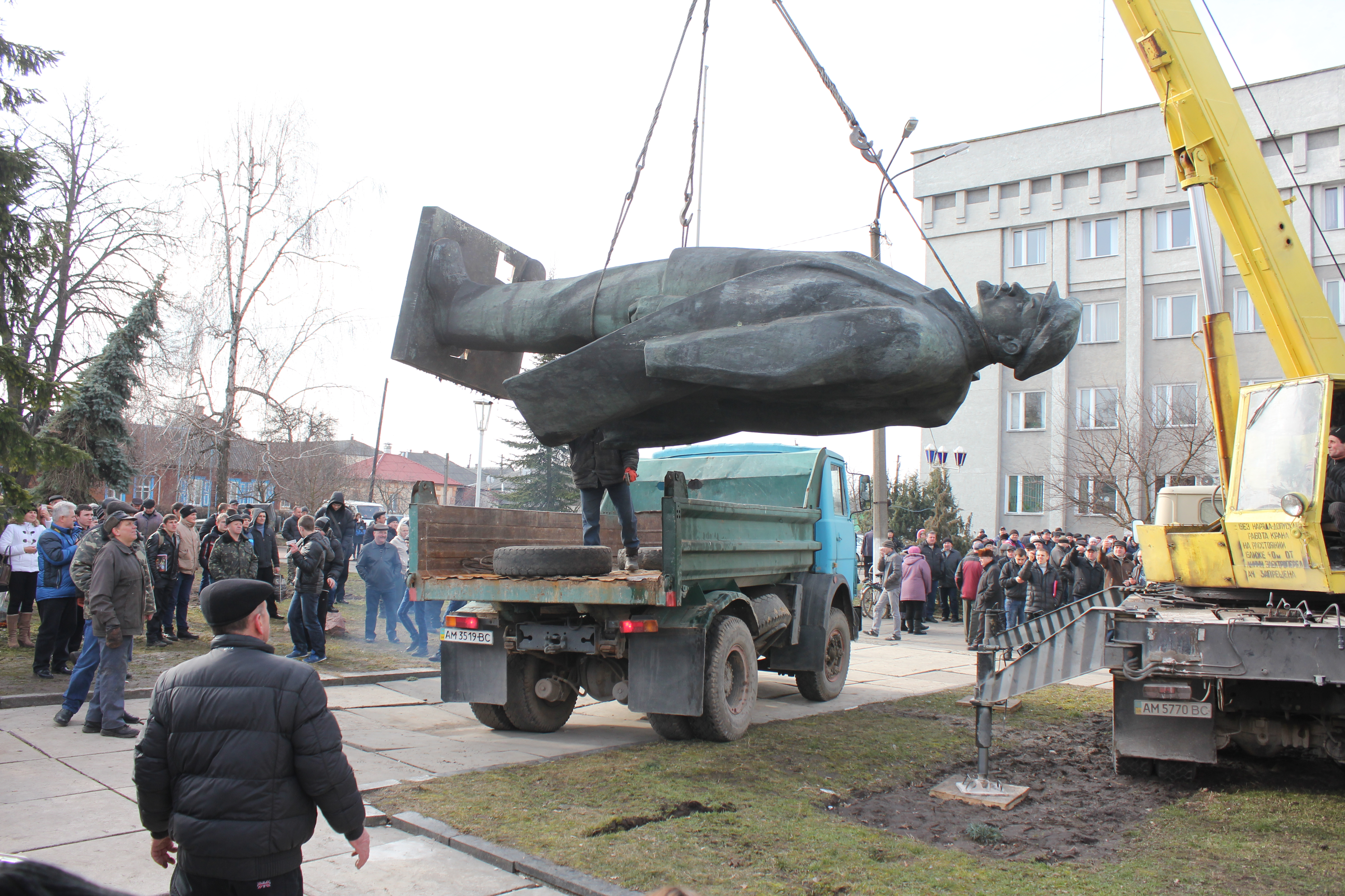 Пам'ятник Леніну В. І., Овруцький район, м. Овруч, площа Леніна.